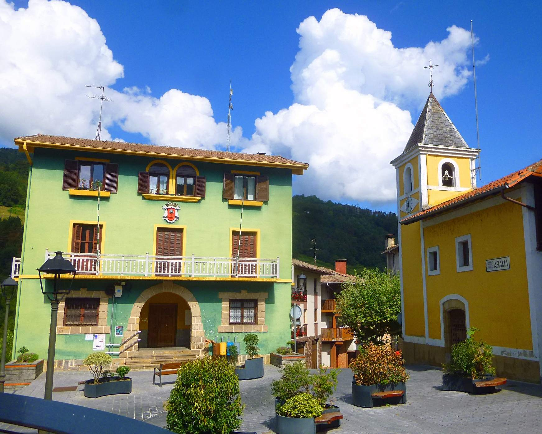 Arama (Gipúzcoa)